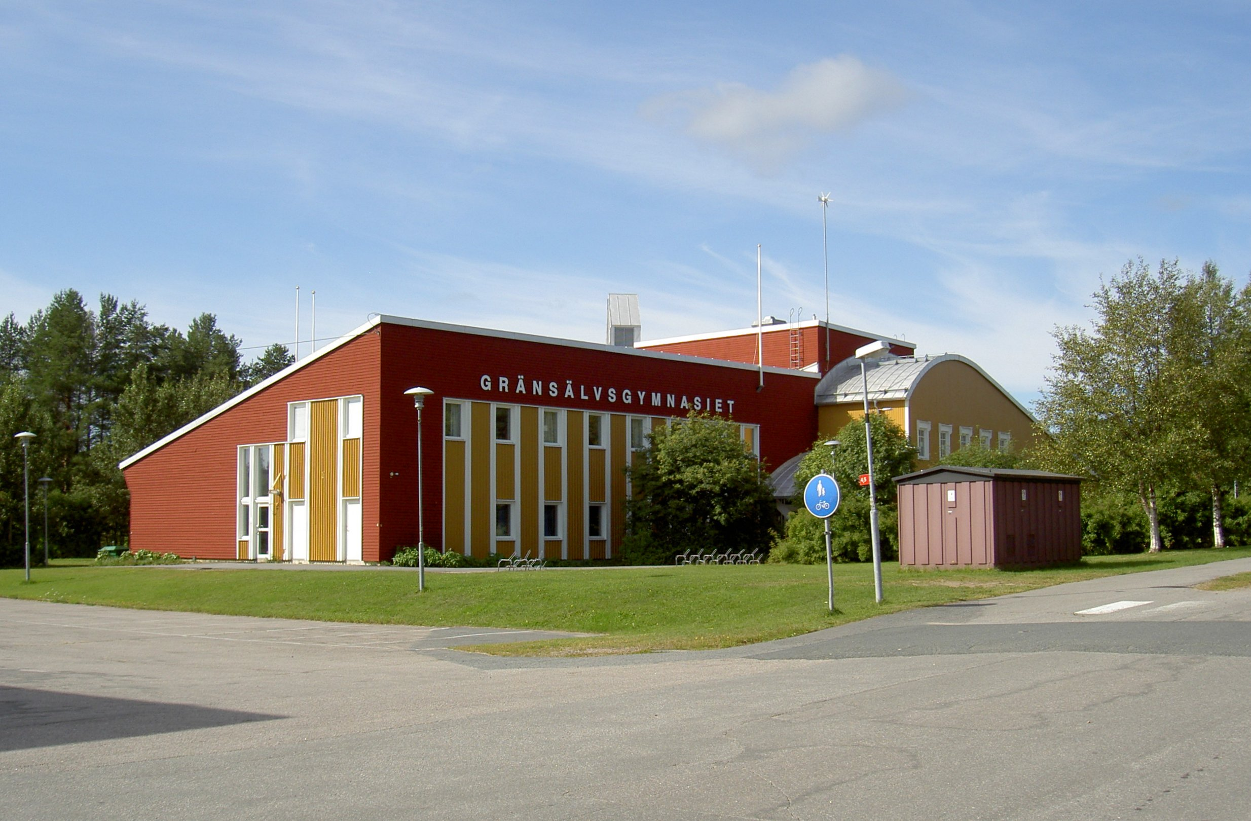 Gränsälvsgymnasiet i Övertorneå centralort.